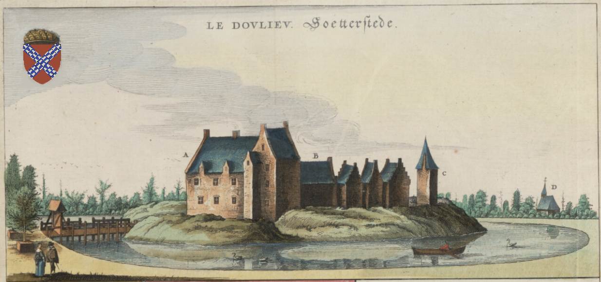 Château de Doulieu. En 1801 une bande de brigands, appelés « chauffeurs » parce qu'ils brûlaient les pieds de leurs victimes pour les faire parler, s'installa sur le site. En 1801, le premier consul Bonaparte, devant l'émoi de la population, mit fin à leurs exactions en faisant procéder également à la destruction de ce repère. De nos jours, il ne reste plus du château que son emplacement, constitué par une immense motte de terre, entourée d'eau.